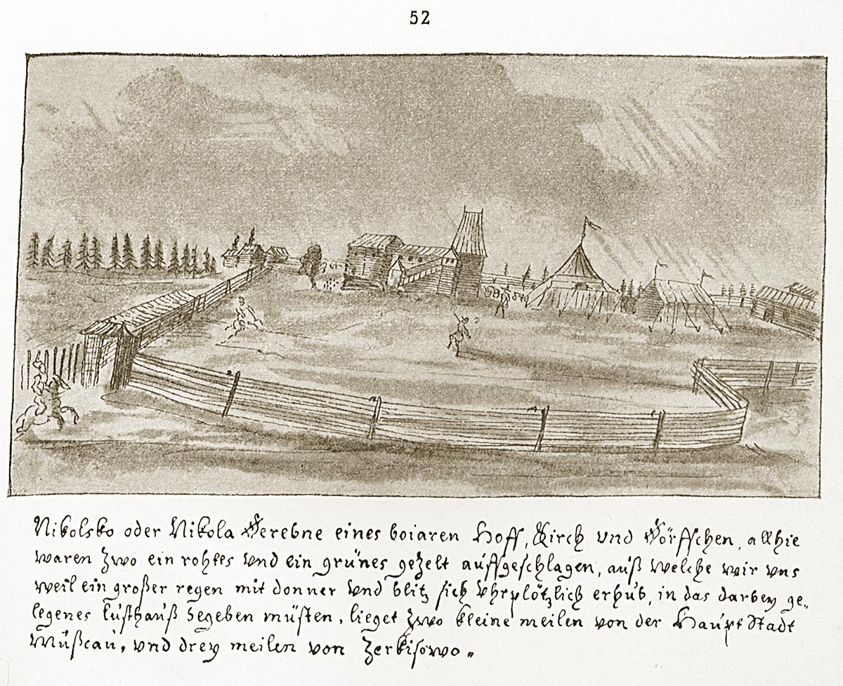 Никольское